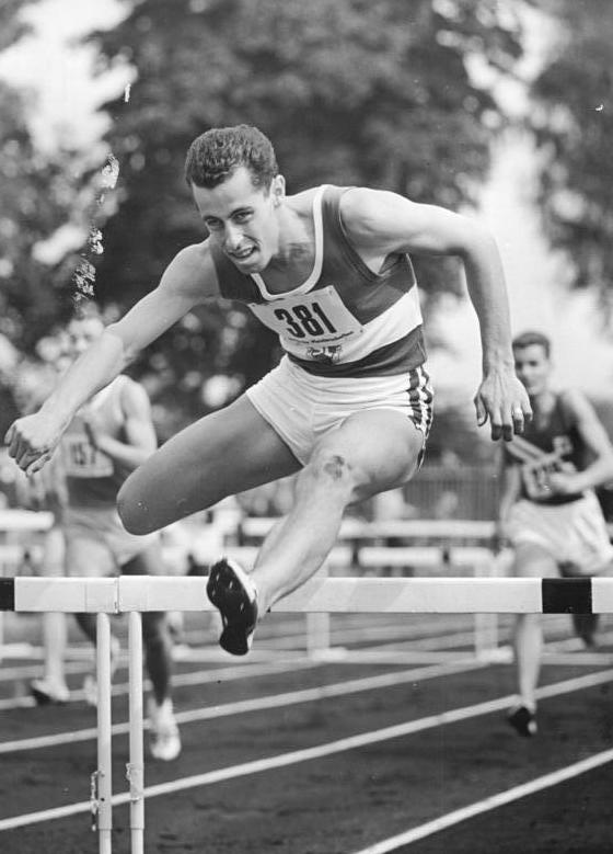 Joachim Singer Zentralbild Kohls 31.8.1963 XIV. Deutsche Leichtathletik-Meisterschaften in Jena vom (30.8.-1.9.1963) UBz: Im Vorlauf über 200-m-Hürden der Männer siegte Titel-Verteidiger Joachim Singer (SC Karl-Marx-Stadt - Mitte) in 24,1 sek. damit lief er die schnellste Zeit, die in den Vorläufen gelaufen wurde.